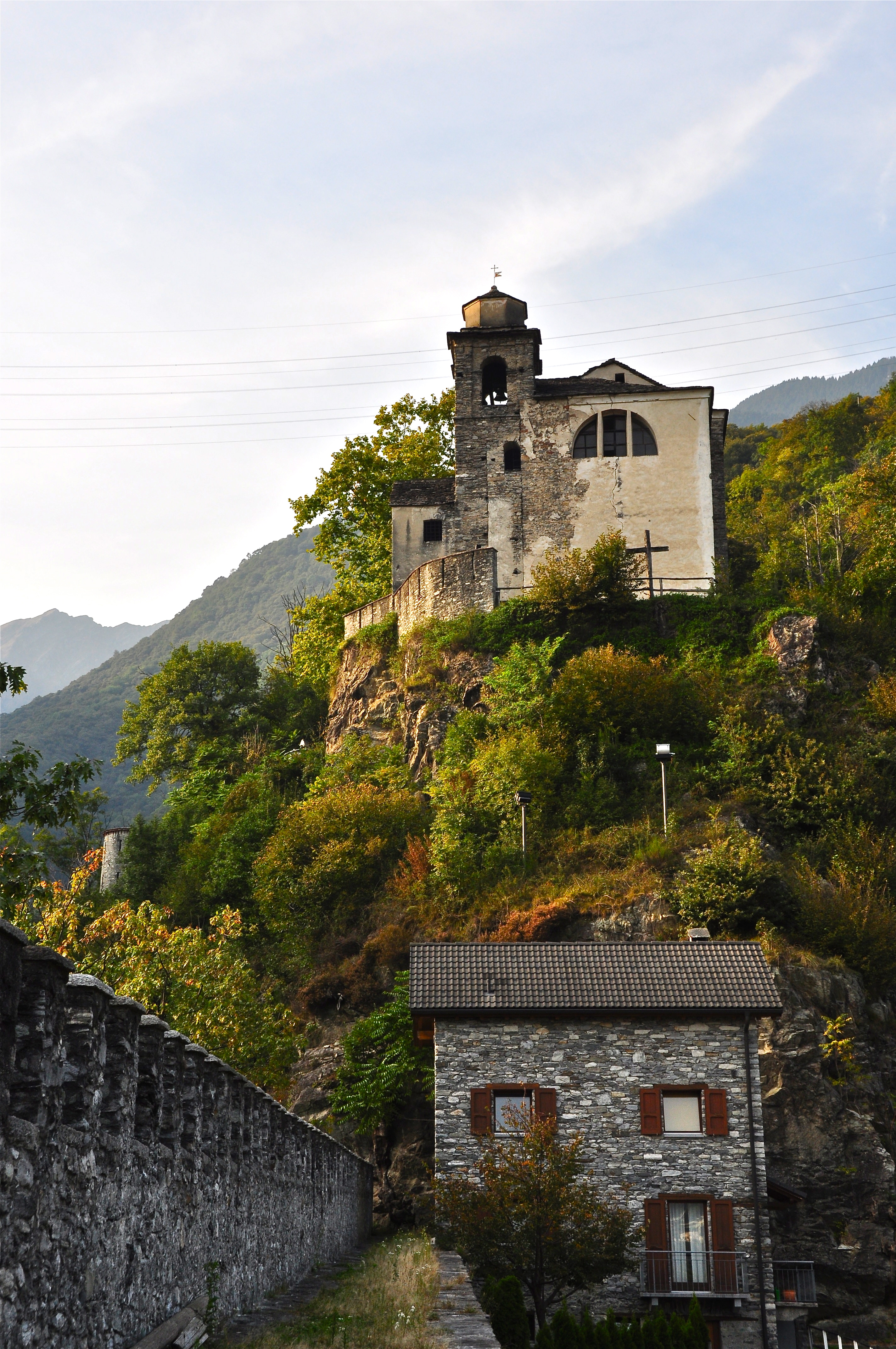 La chiesa vista dal villaggio